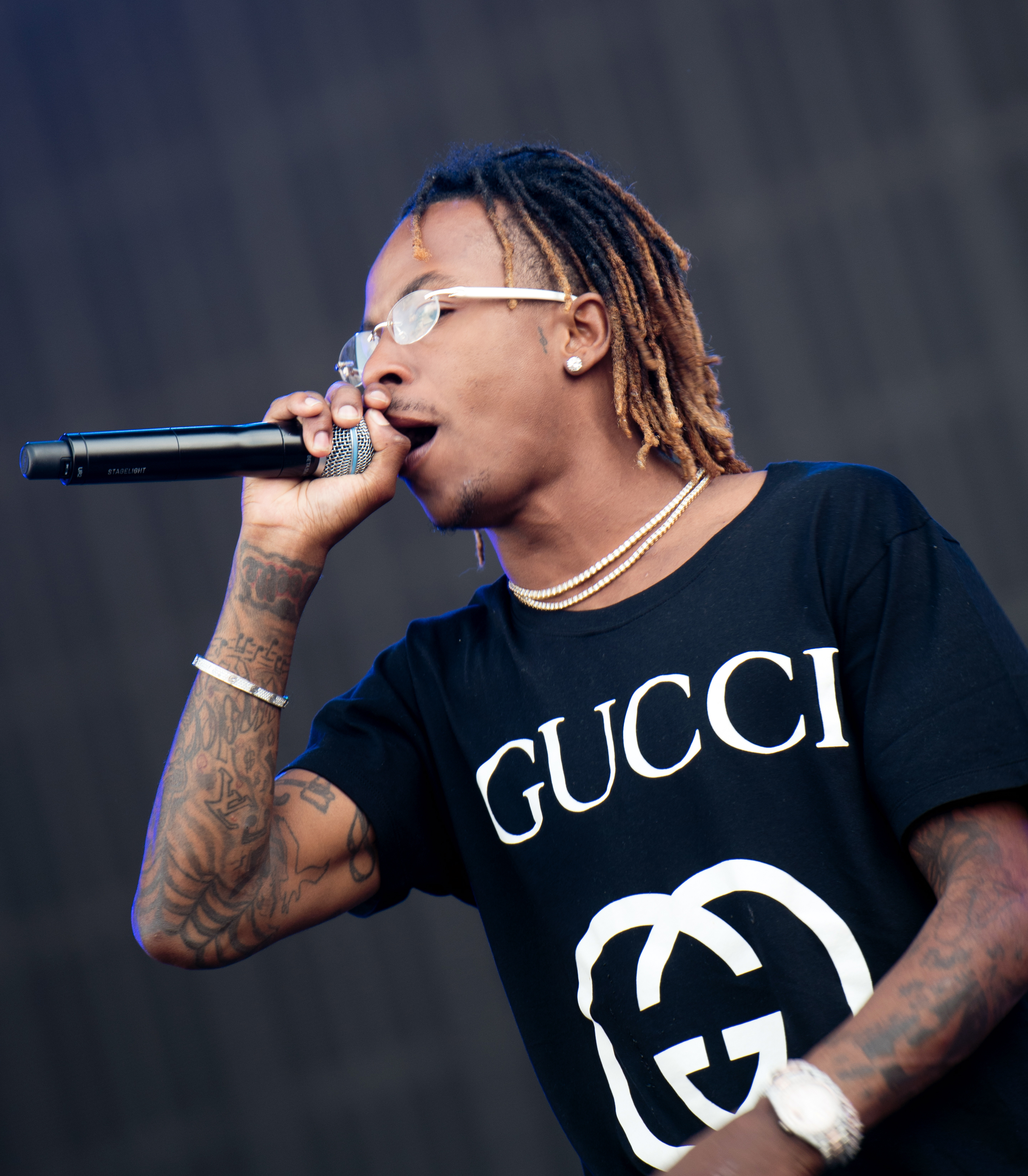 Rich The Kid live auf dem Openair Frauenfeld 2019